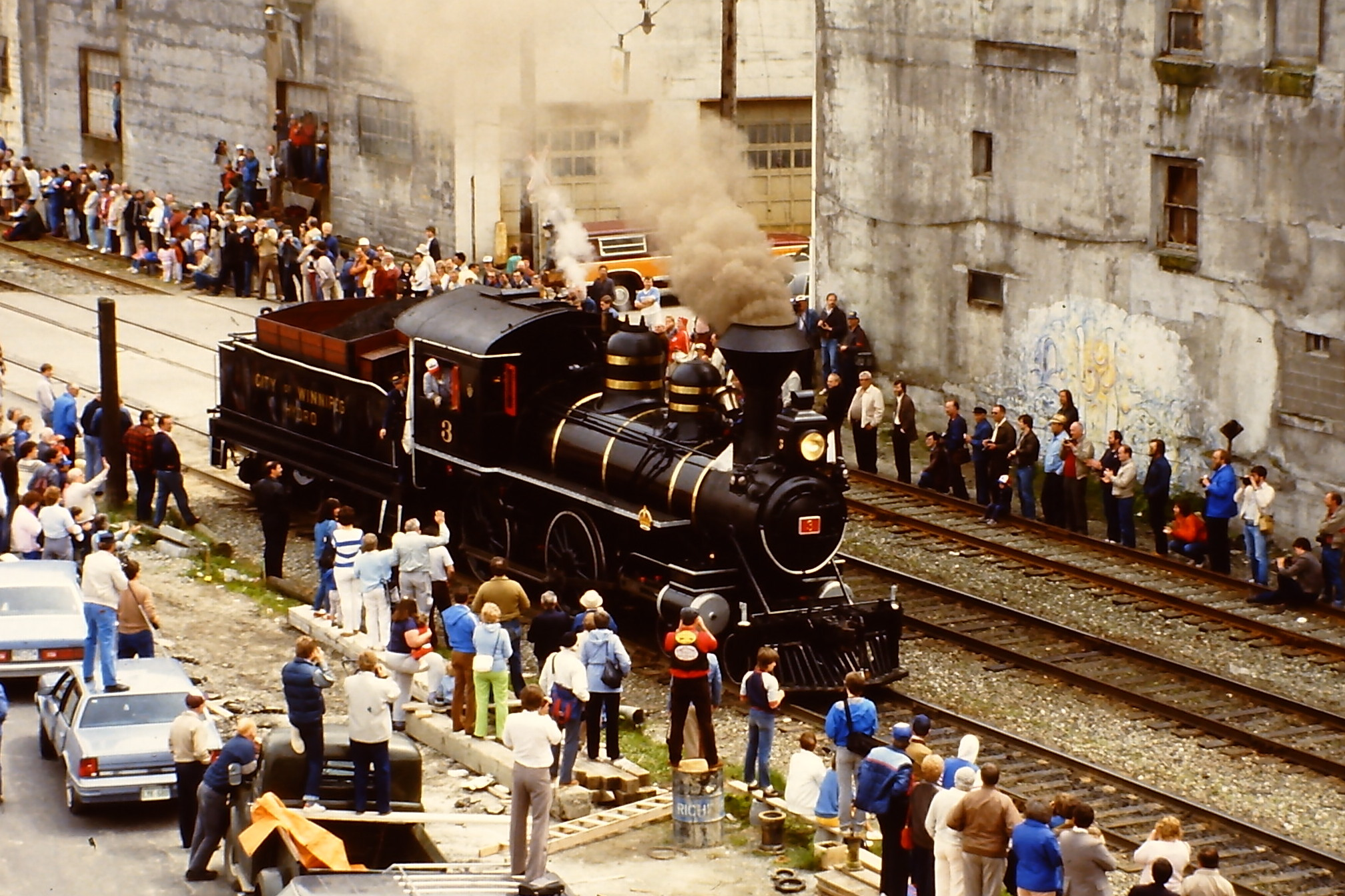 Nummer 3 der Prairie Dog Railway, ex Canadian Pacific und City of Winnipeg Hydro auf der SteamExpo 86 (Parade)